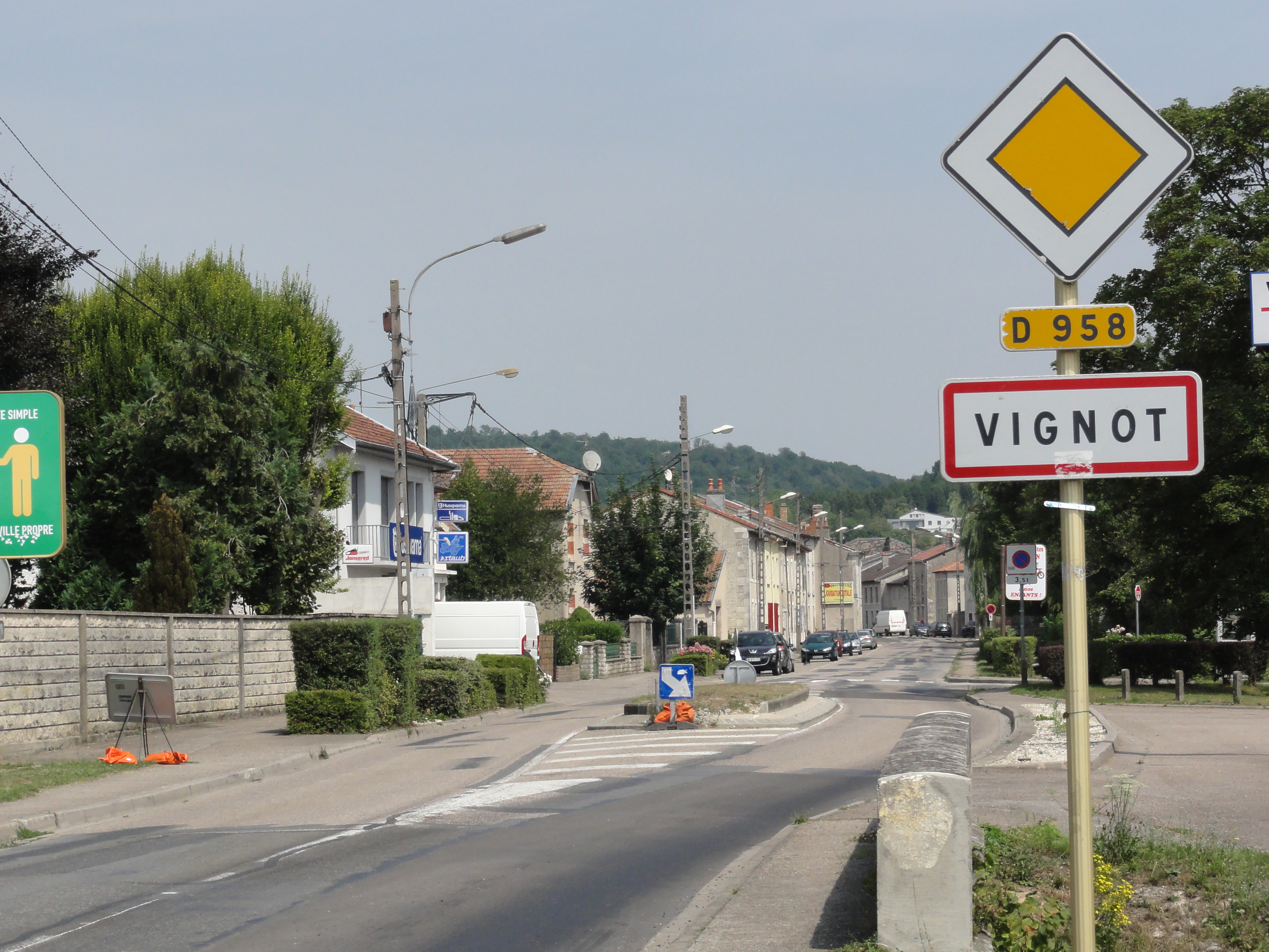 Vignot (Meuse) city limit sign